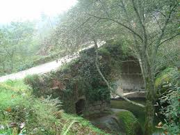 Folhada Ponte do Arco2